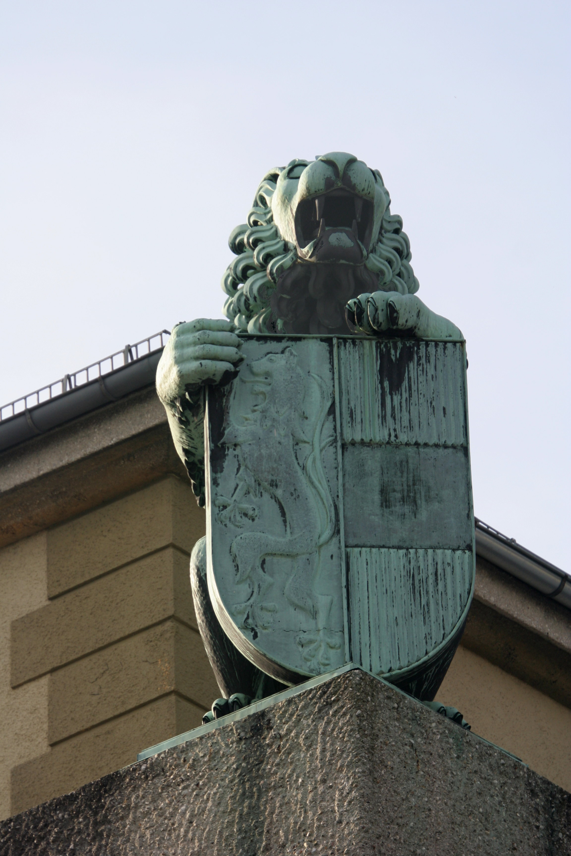 Description: Coat of arms of the state of Salzburg. On the top of "Festspielhaus". Landeswappen von Salzburg, am Festspielhaus; von Rudolf Reinhart (1897–1975), österreichischer Metallplastiker.